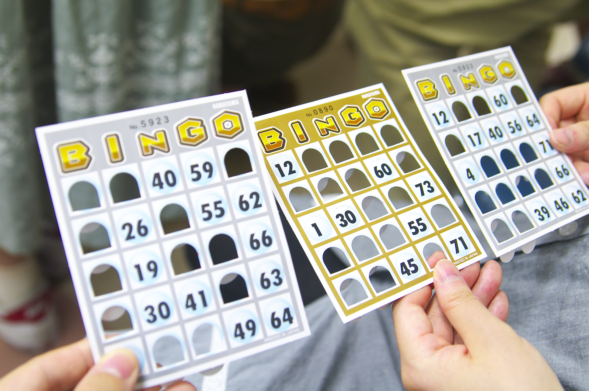 さっぱり当たらないビンゴ